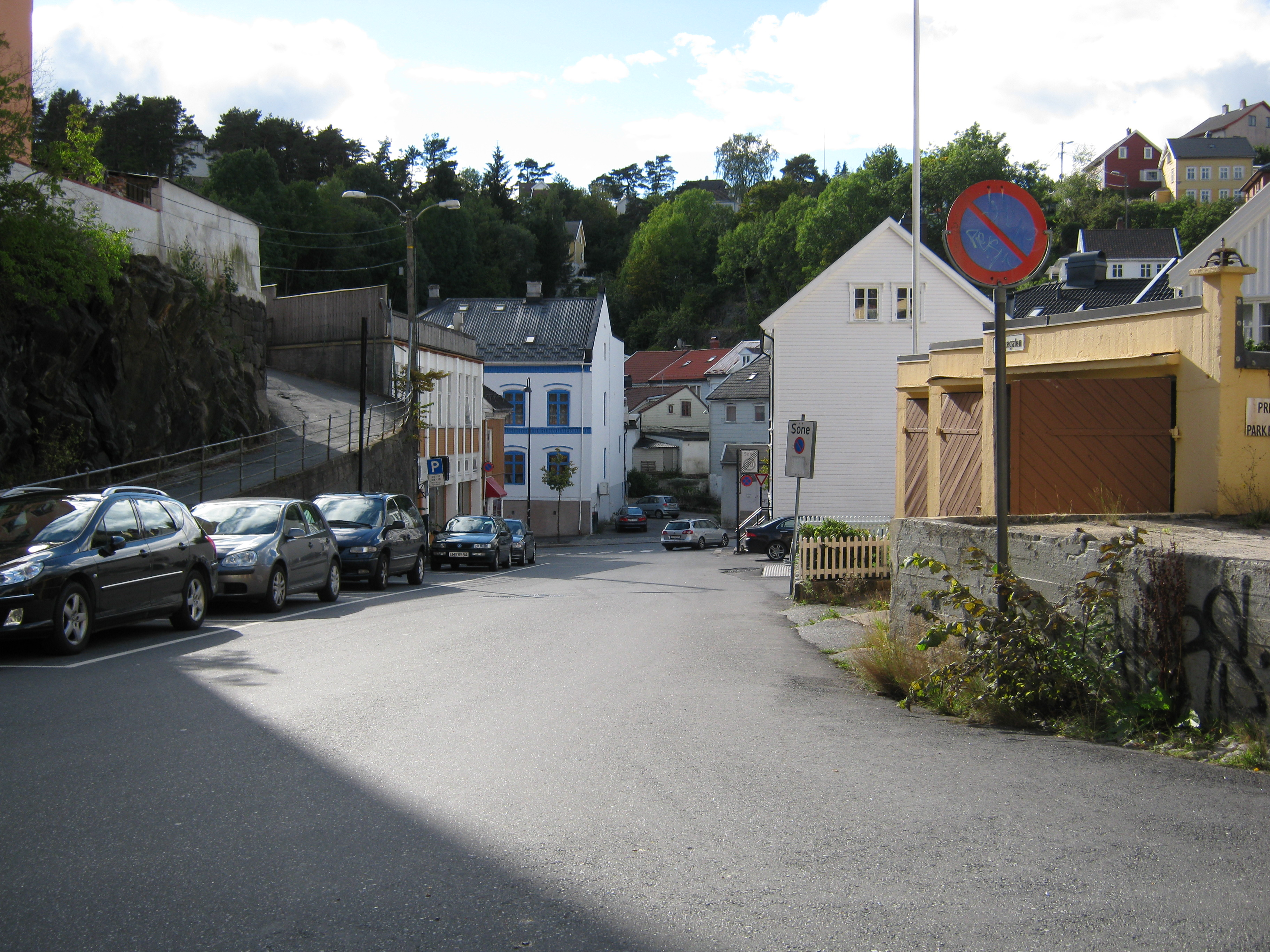 Munkegaten Arendal, fra Østregate